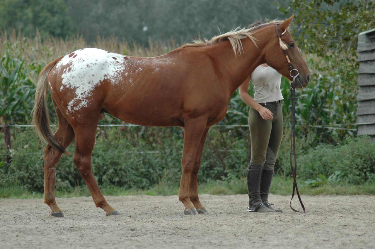 Appaloosa